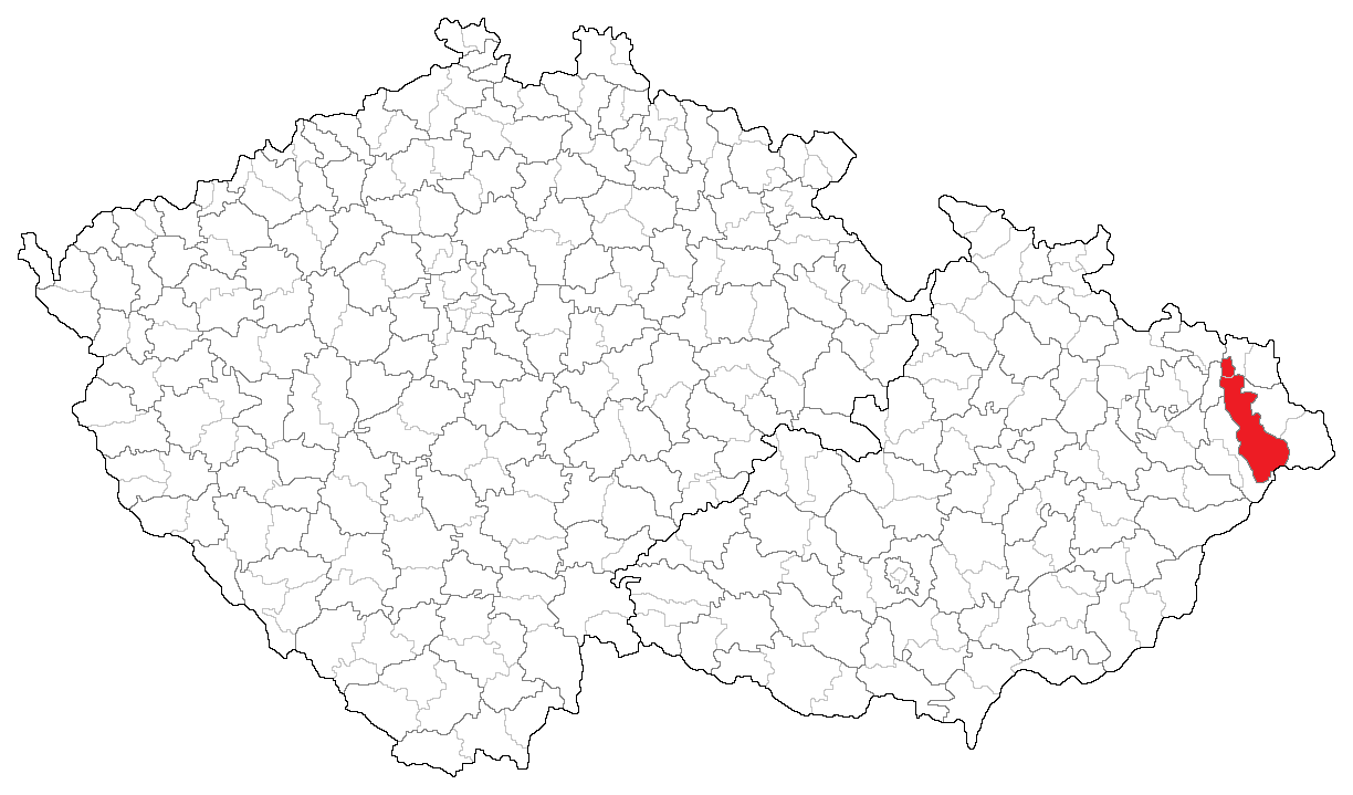 Politický okres Frýdek k roku 1938